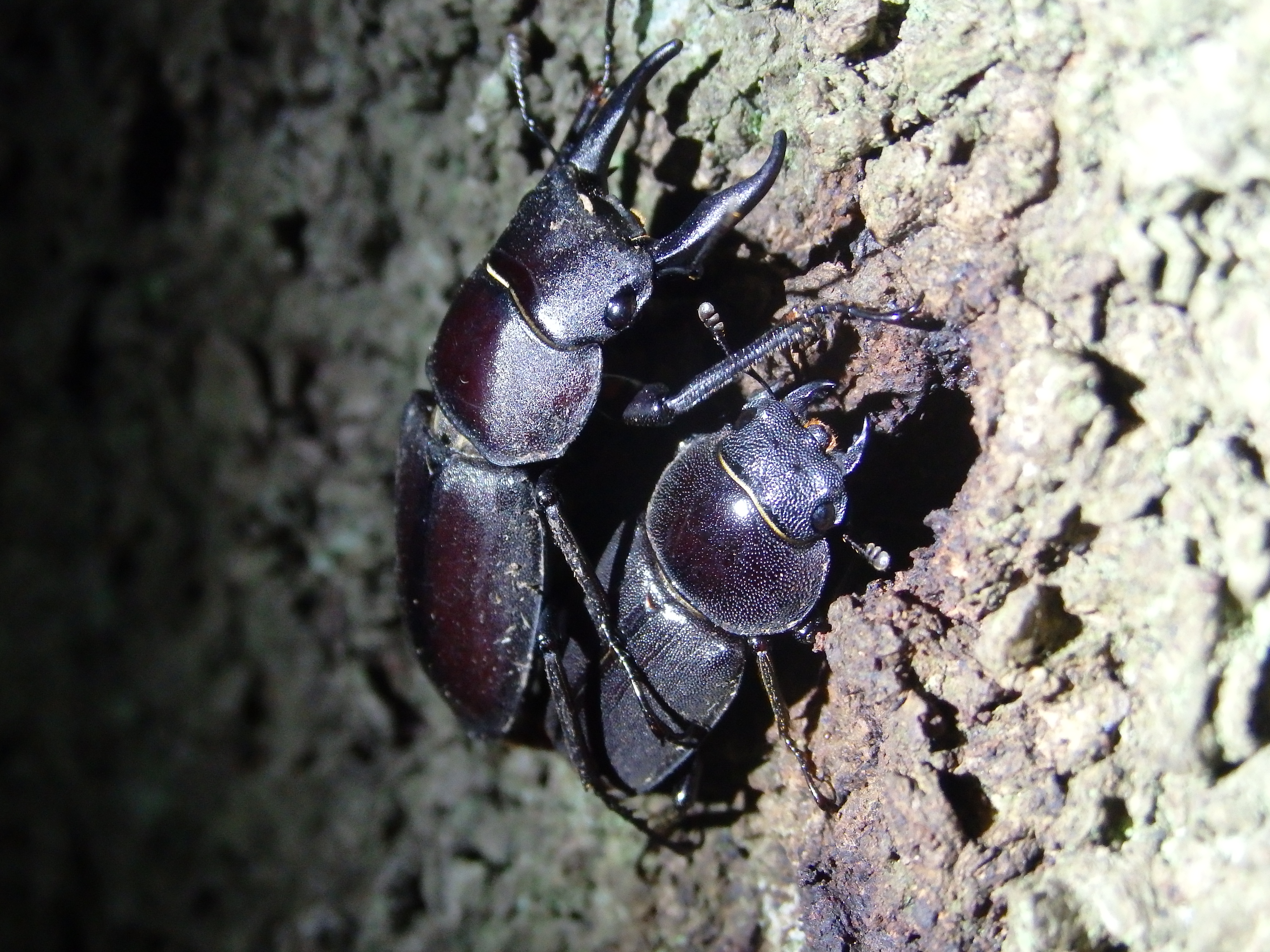 シラカシの樹液で交尾するコクワガタ